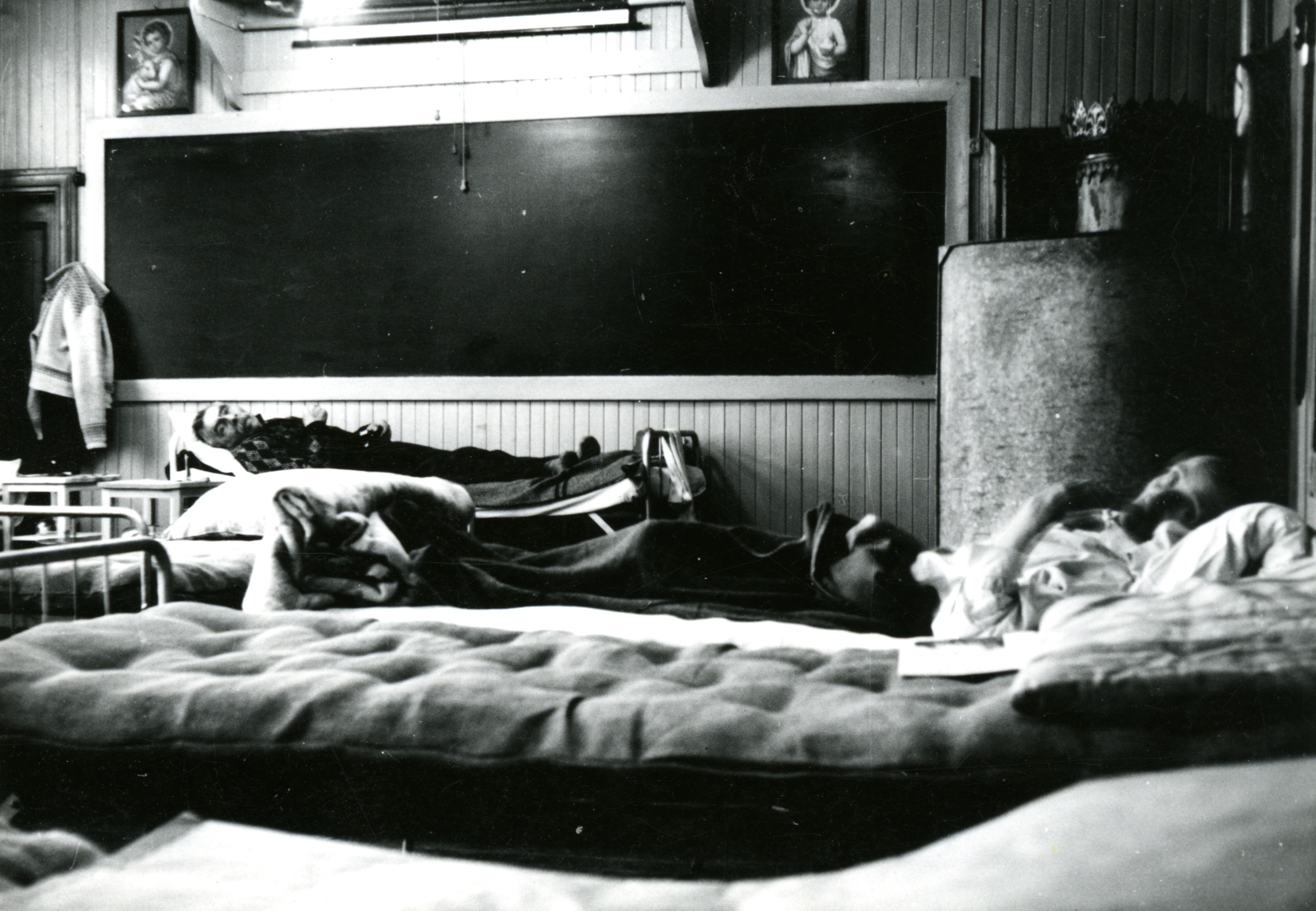 Format: Fotopositiv Dato / Date: 1944 Fotograf / Photographer: Ukjent Sted / Place: Byåsen, Trondheim (før 1964 i Strinda kommune) Wikipedia: Operation Nordlicht Wikipedia: Tvangsevakueringen og nedbrenningen av Finnmark og Nord-Troms WikiStrinda: Byåsen skole Eier / Owner Institution: Trondheim byarkiv, The Municipal Archives of Trondheim Arkivreferanse / Archive reference: Byåsen Skole Ua Diverse Foto. F23000 Merknad: Under tvangsevakueringen av Finnmark 1944-45 ble Byåsen skole benyttet til innkvartering av de evakuerte og som midlertidig reservesykehus.